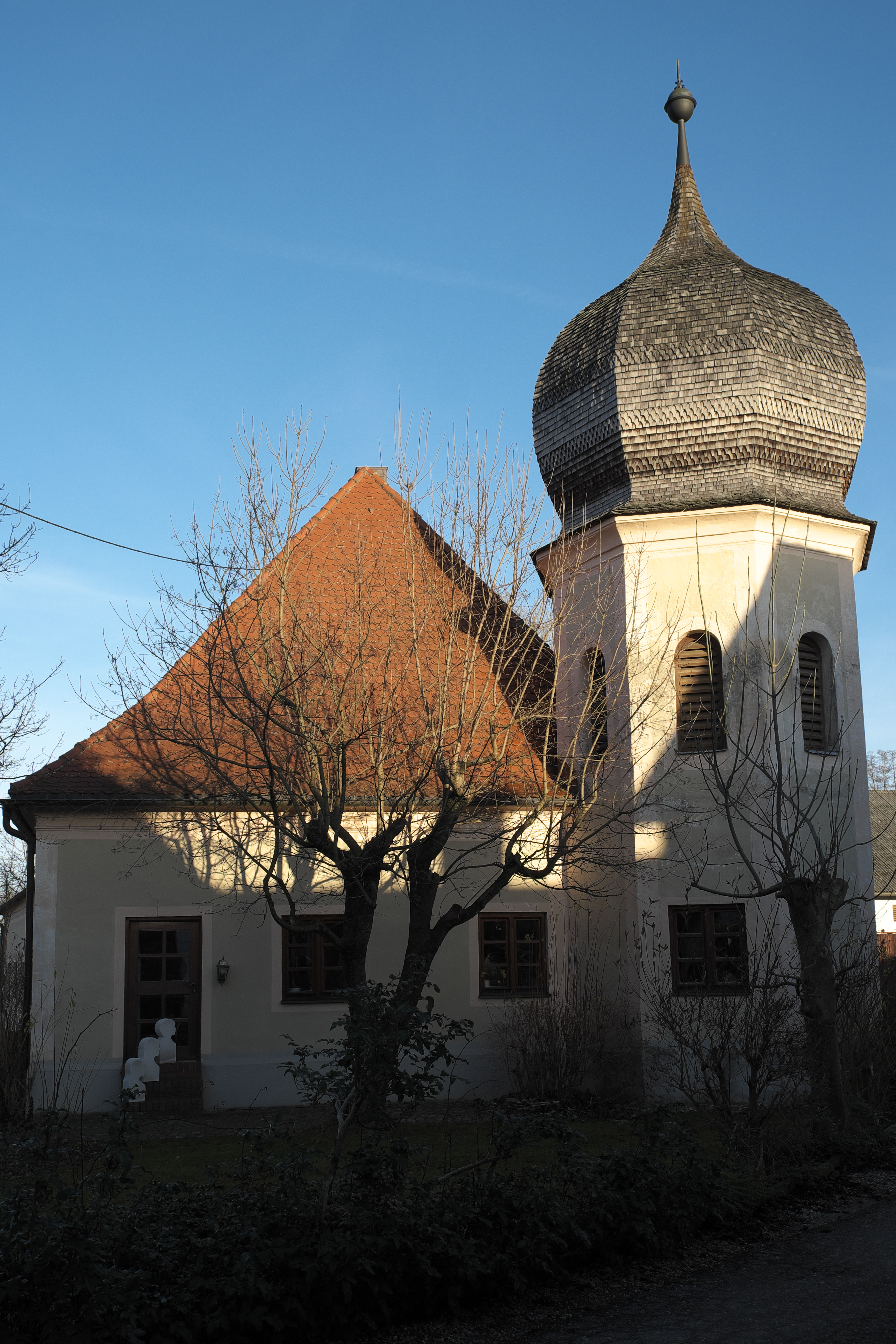 Schloss Euernbach in Euernbach, einem Ortsteil von Scheyern im Landkreis Pfaffenhofen an der Ilm (Bayern/Deutschland)